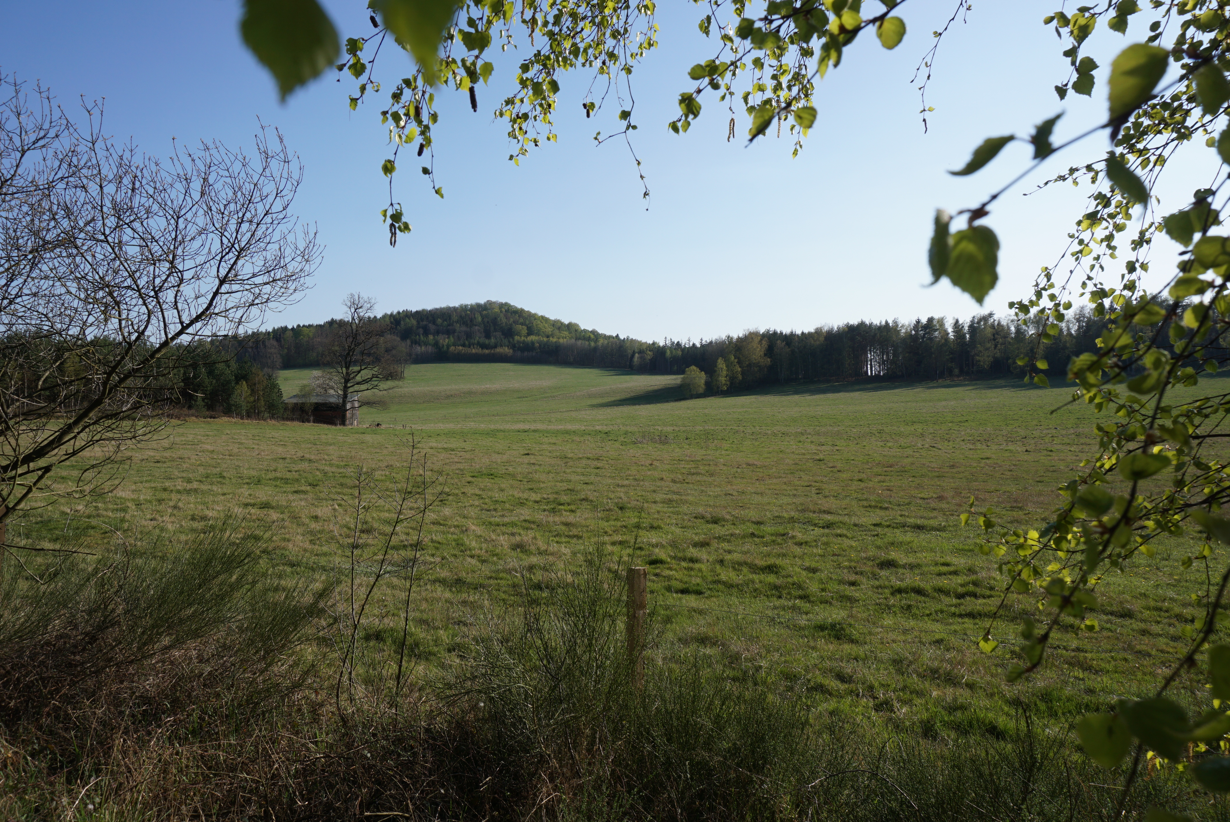 Strážný (Hutberg, m) u Radvance - pohled od SV z okolí rozcestí U posedu